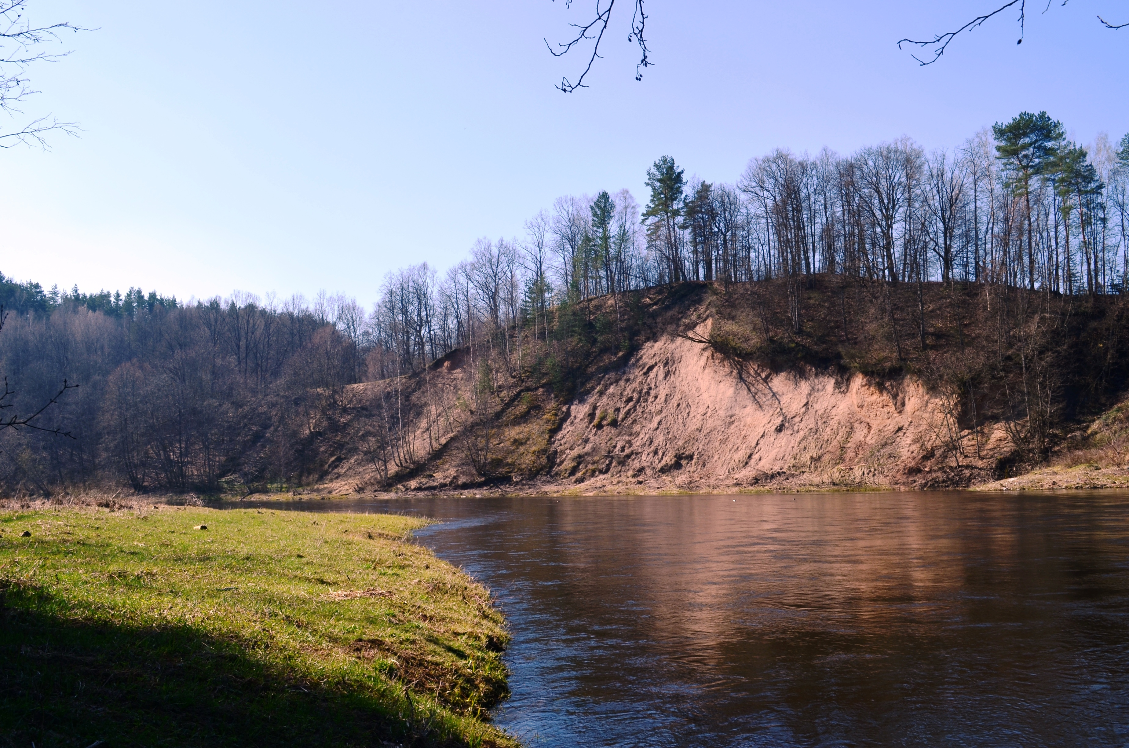 Naujanerių skardis nuo Vyrių pusės, Vilniaus raj.